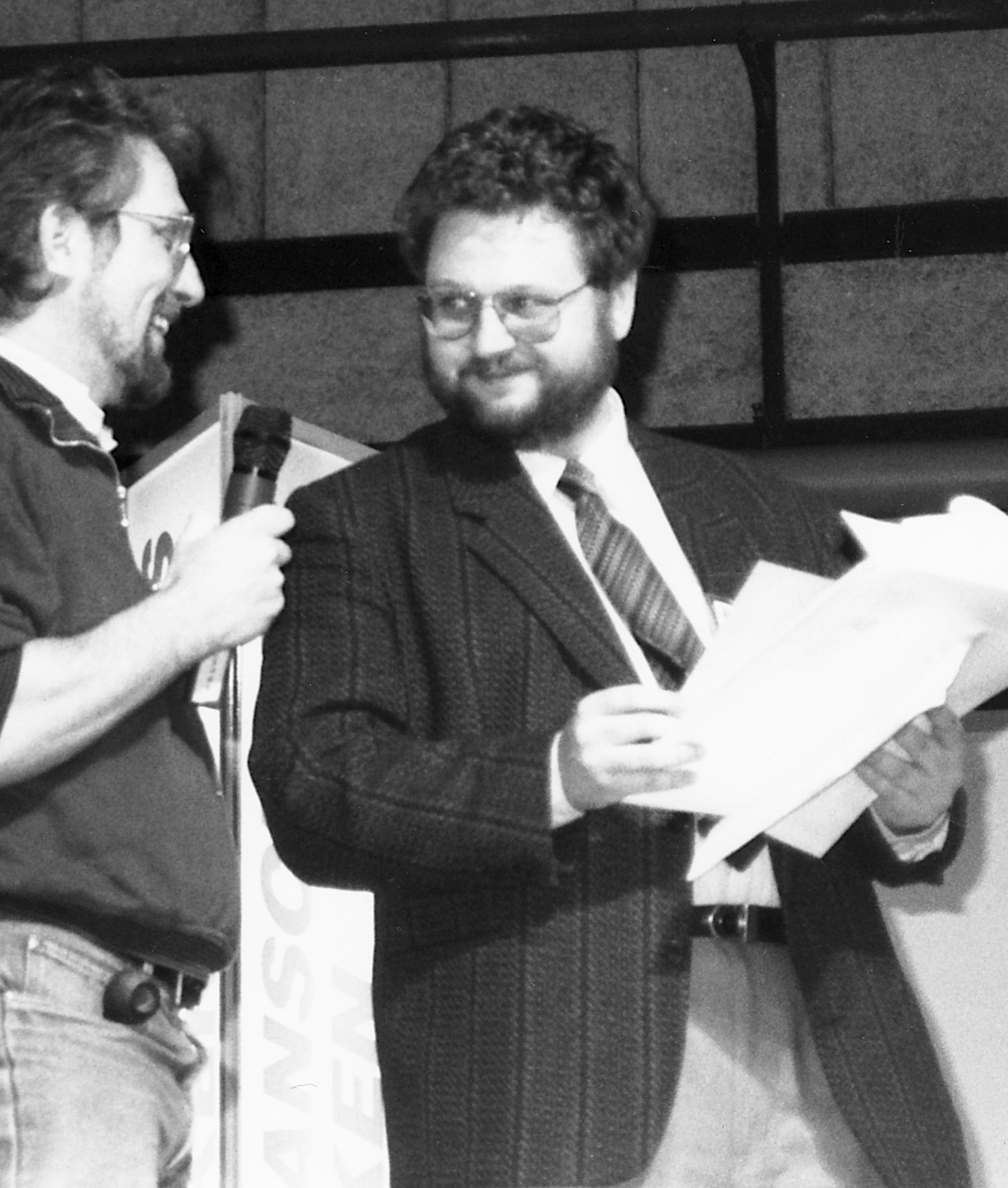 Daniel Atterbom (t.h) och Horst Schröder, på scenen vid en prisutdelning under Serie-Expo -91 i Stockholm